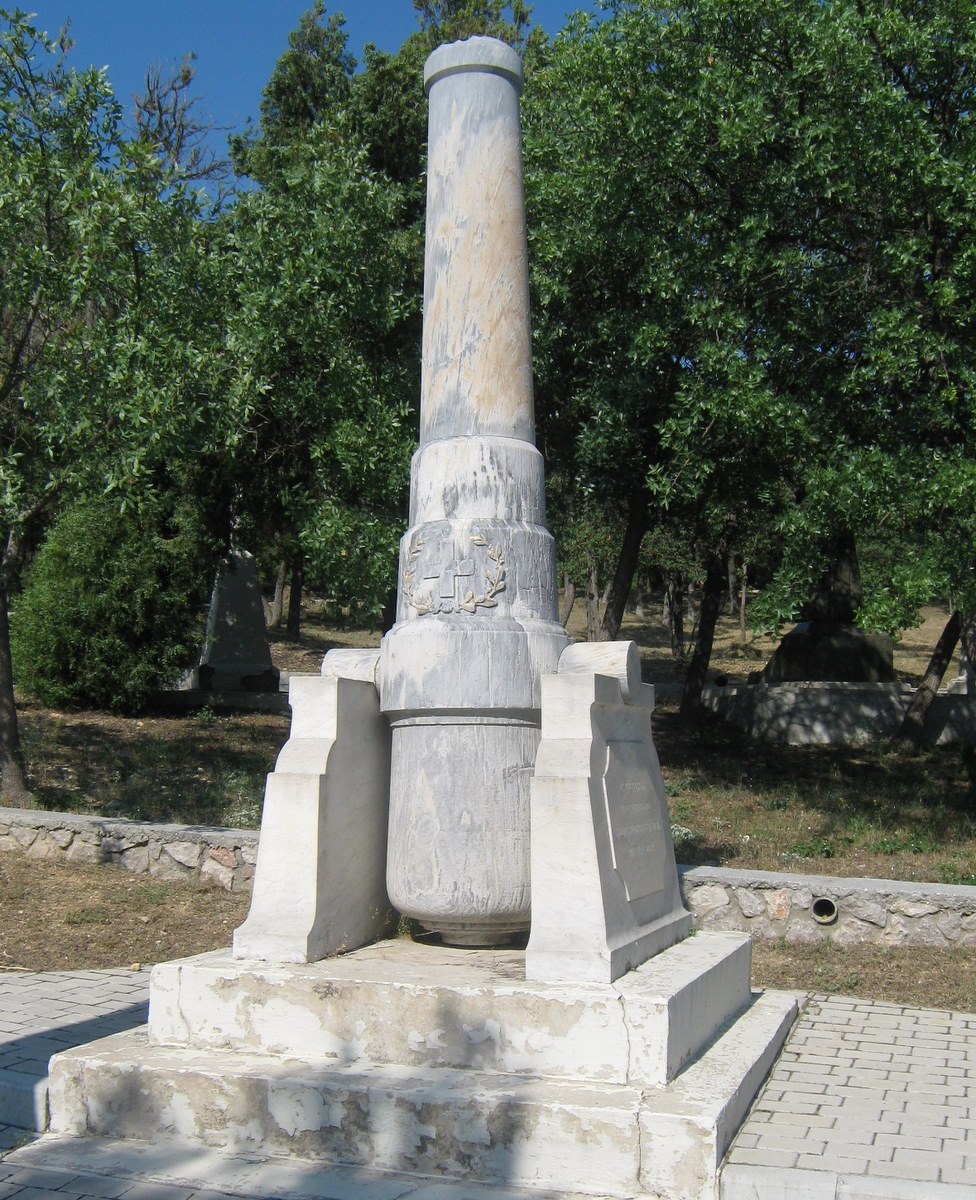 Могила Михайла Івановича Ставракі